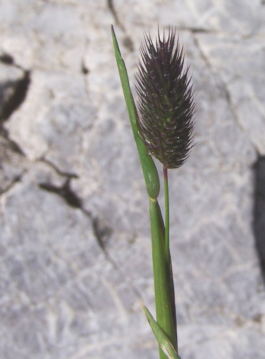 Phleum alpinum (pl. tymotka alpejska), habitat: West Tatra Mountains, Małołączniak